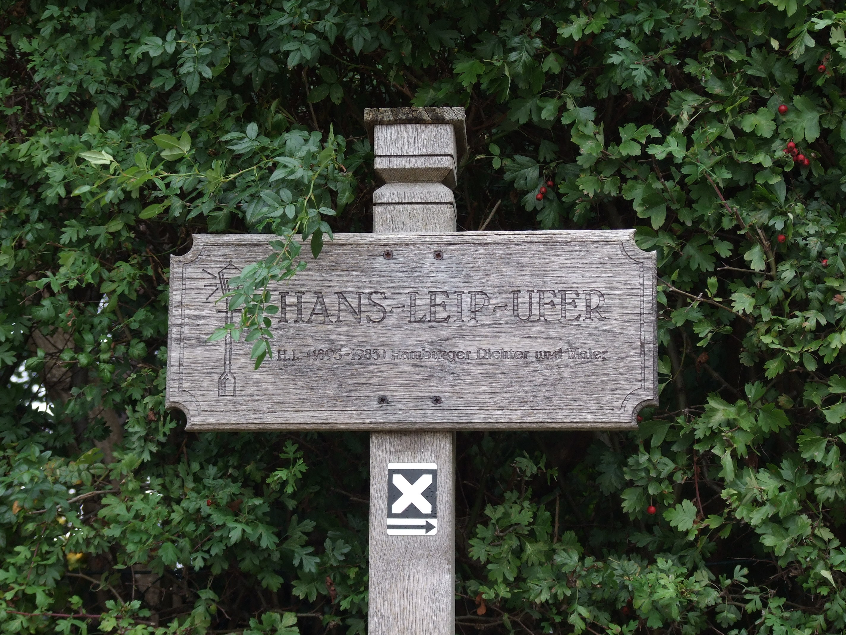 Hans-Leip-Ufer in Klein Flottbeck